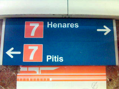 Info from Line 7 of Madrid Metro. Información de la línea 7 del Metro de Madrid.